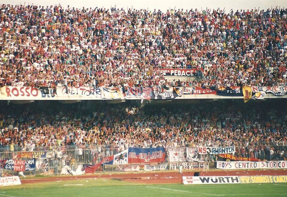 Veduta dei 15.000 tifosi cosentini al Via Del Mare di Lecce nella partita Lecce -Cosenza serie B 14 giugno 1992